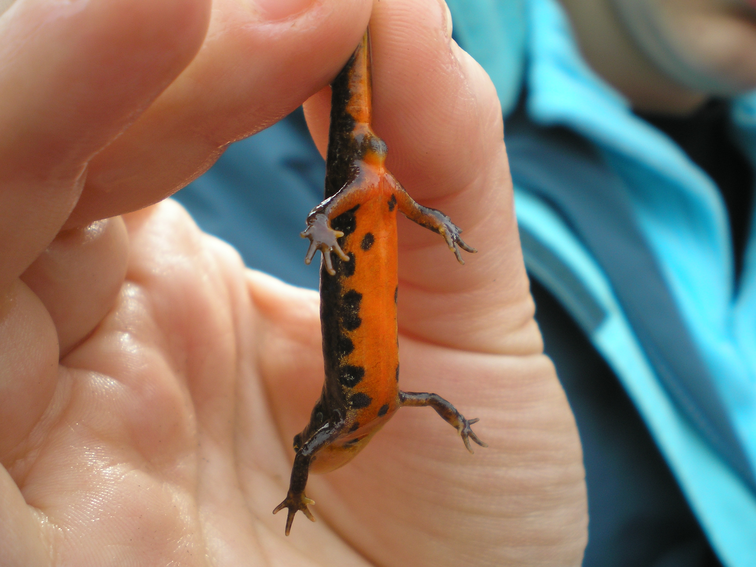 Triturus boscai in Galicia, Spain.